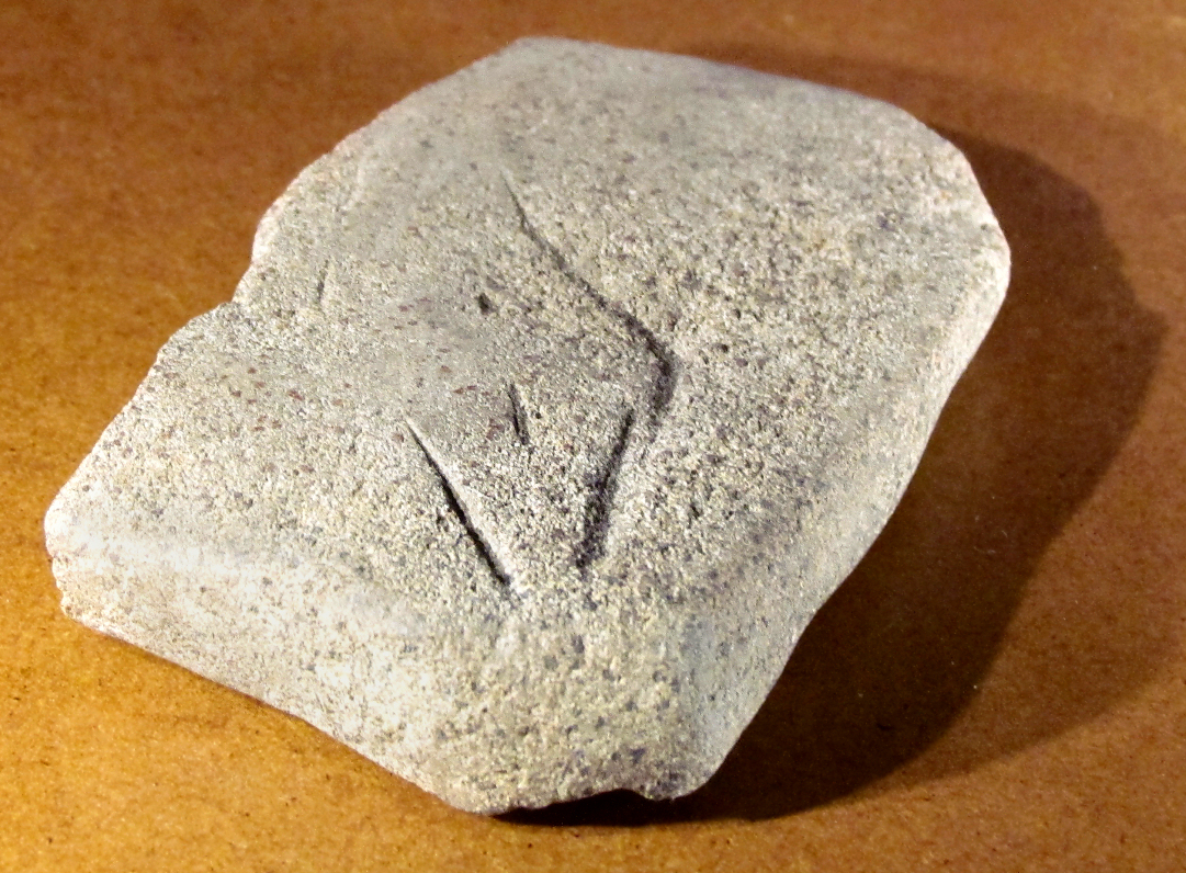 Die Venus von Bierden in der Ausstellung "Bewegte Zeiten. Archäologie in Deutschland" in Berlin